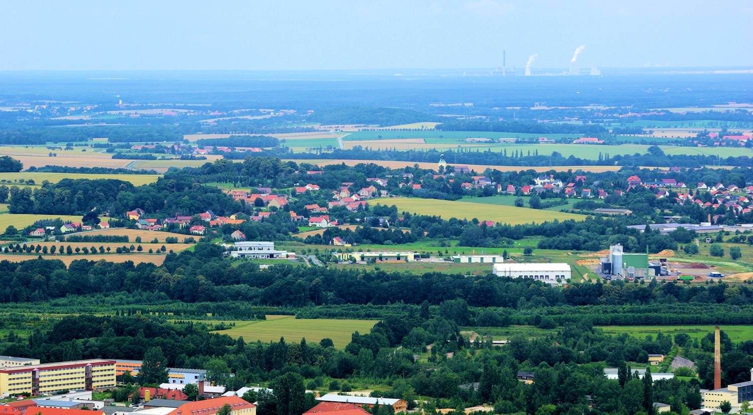 Blick vom König-Friedrich-August-Turm auf Kittlitz und zum Kraftwerk Boxberg